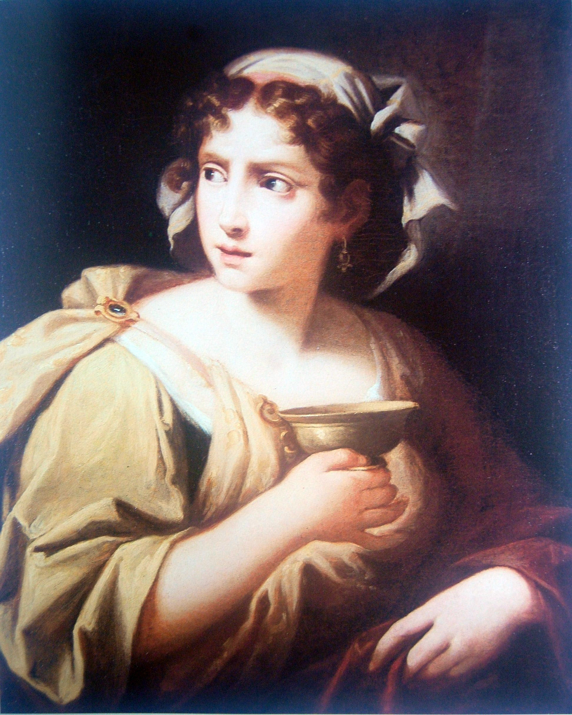 Sofonisbalabel QS:Les,"Sofonisba"